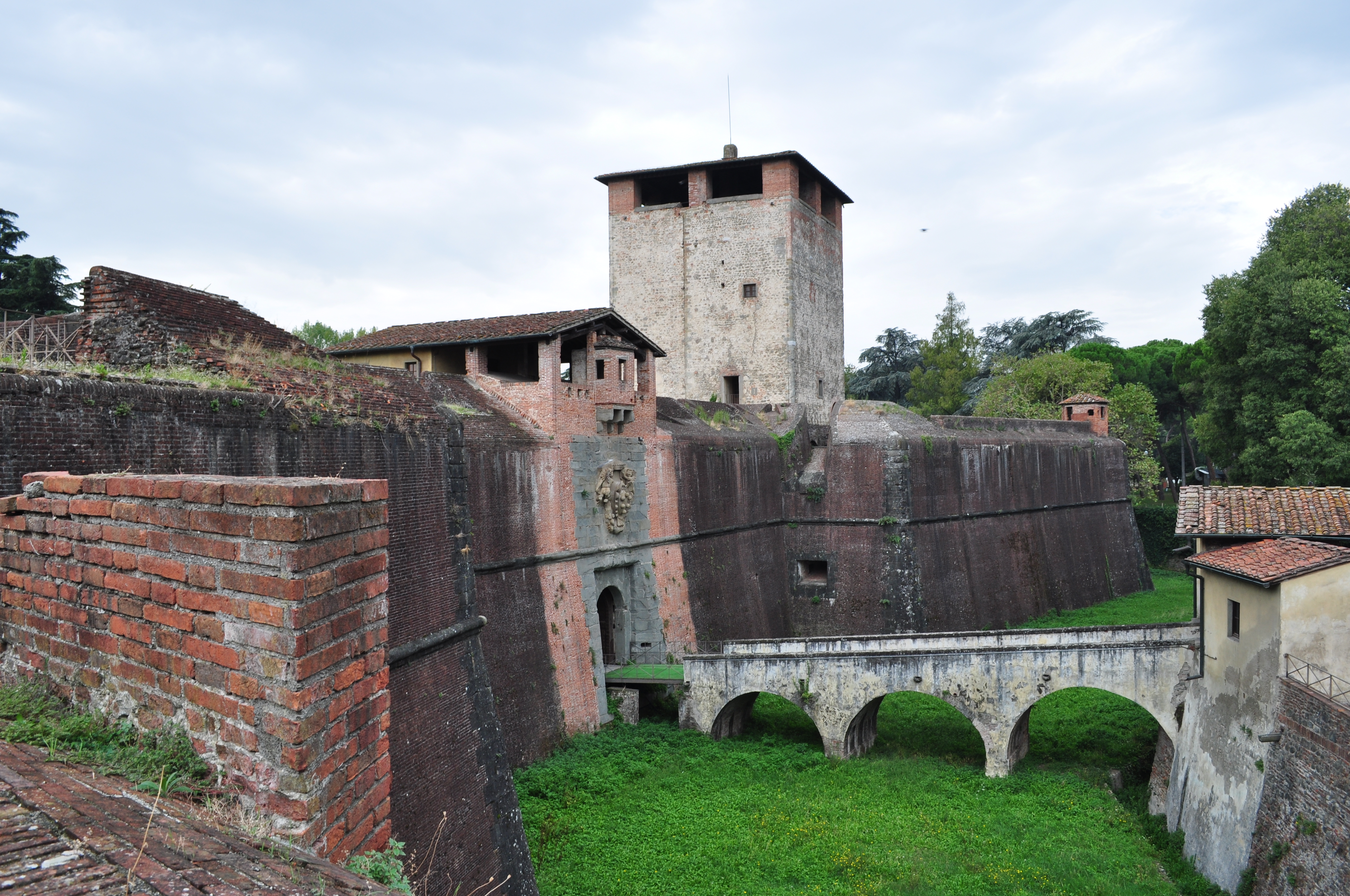 Fortezza di Santa Barbara - MIBAC This is a photo of a monument which is part of cultural heritage of Italy.